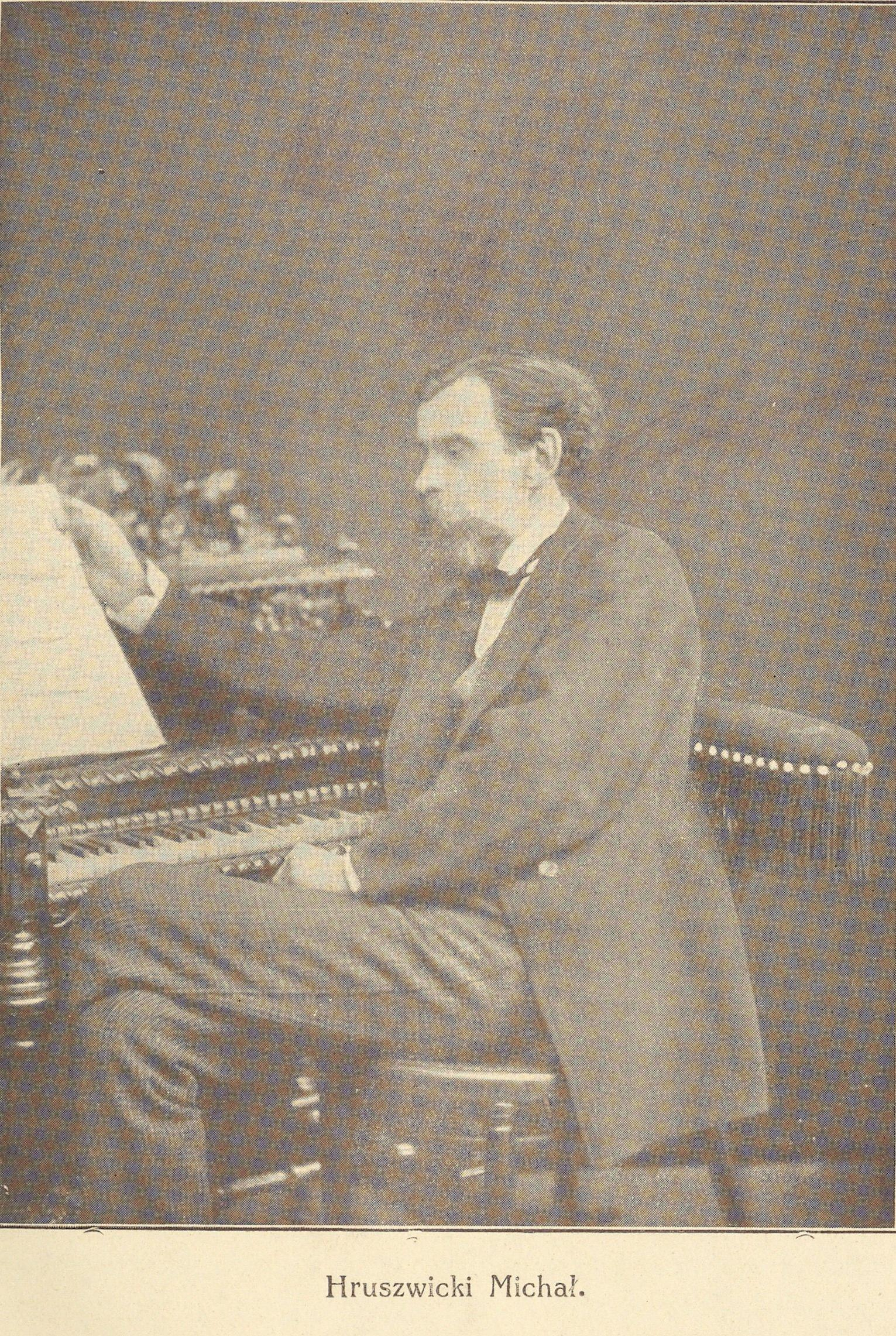 Michał Hruszwicki herbu Korczak (1828-1904) – polski muzyk, kompozytor, deklamator, ziemianin, działacz społeczny w guberni mińskiej. Zdjęcie pochodzi z książki "Ze wspomnień wygnańca", fotografia ze strony 15, autor , Wilno 1912.